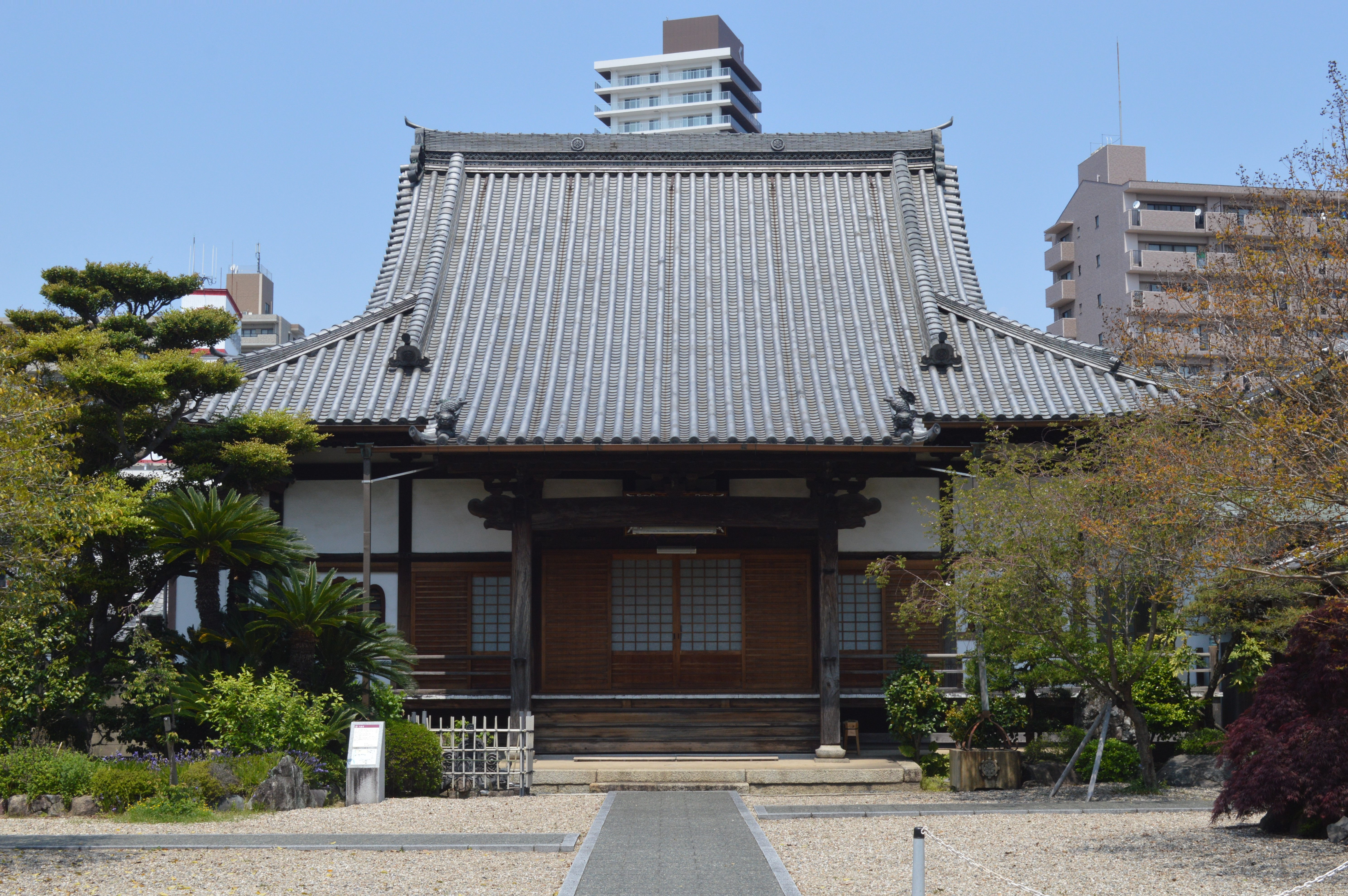 愛知県刈谷市広小路4丁目219にある十念寺。